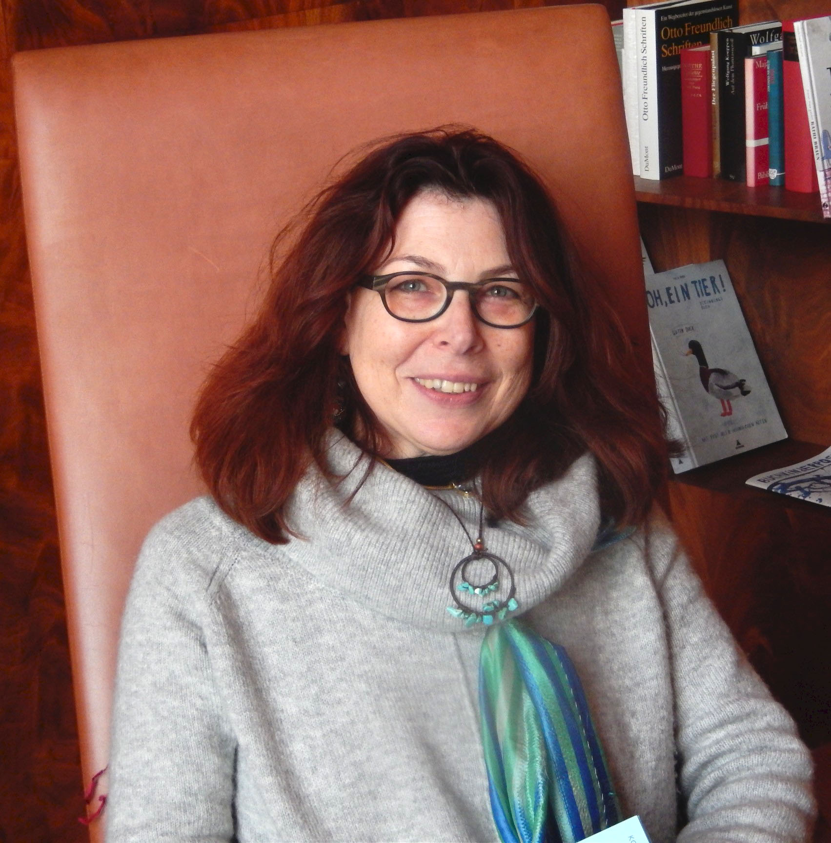 Prof. Doz. Dr. Ursula Schattner-Rieser in Köln 2019Depicted person: Ursula Schattner-Rieser